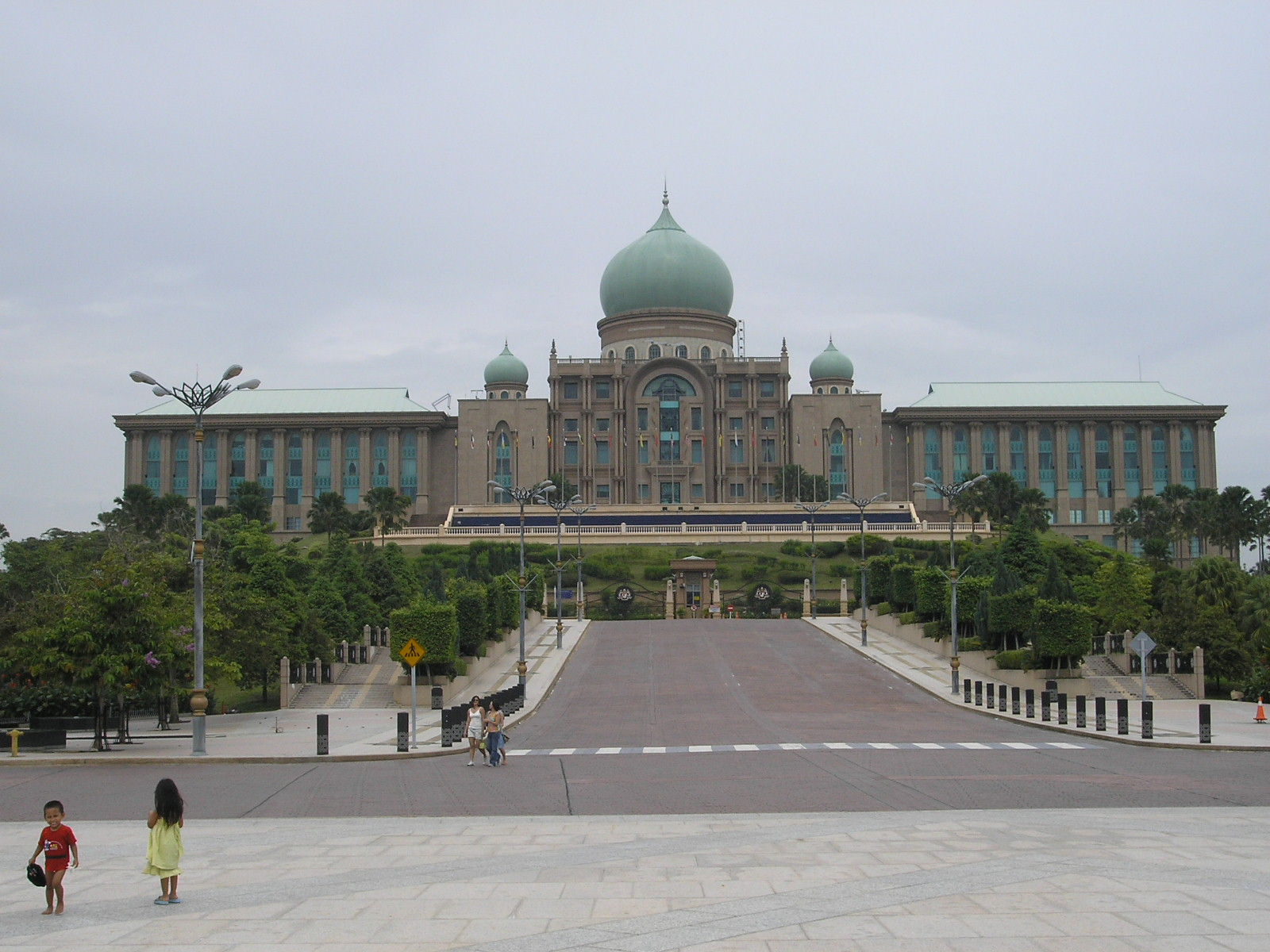 The Perdana Putra in Putrajaya.